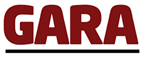 Mancheta del diario Gara.